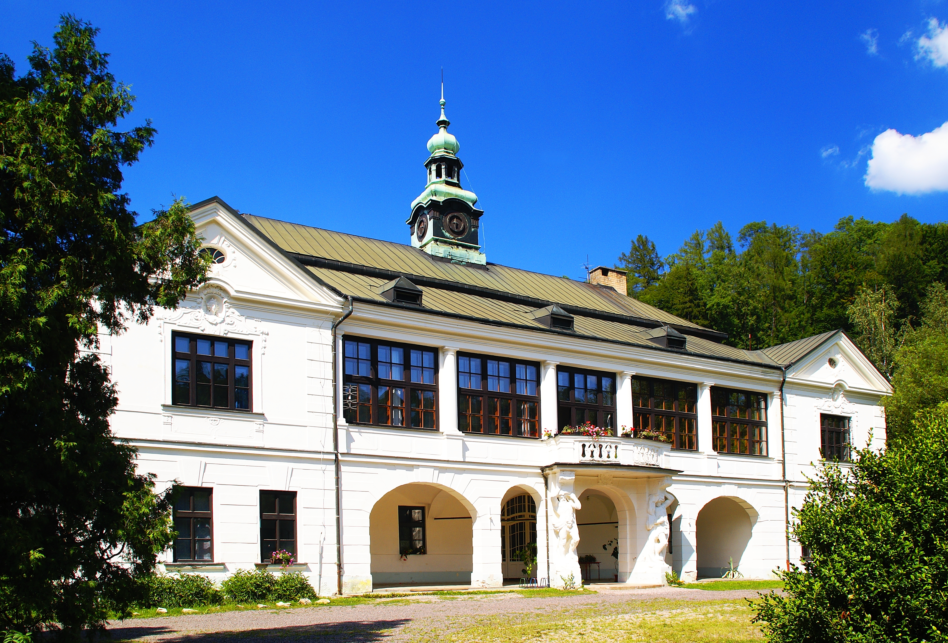 Zámek v Brandýse nad Orlicí.